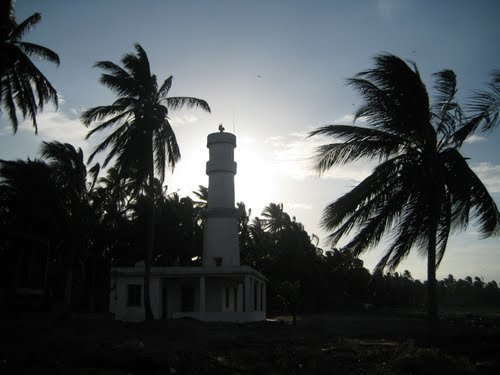 Faro ubicado cerca de la bocana del río González.